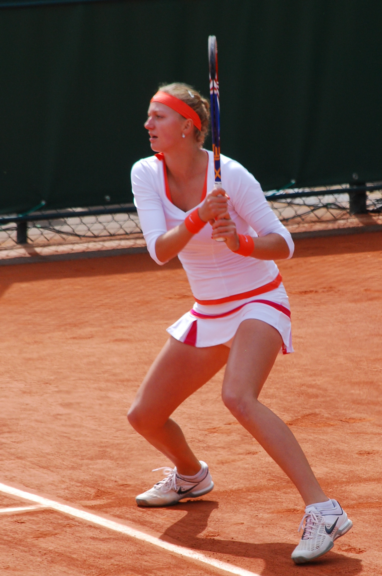 Roland Garros 2011.